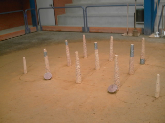 Aspecto del castro con los bolos y los dos miches colocados.